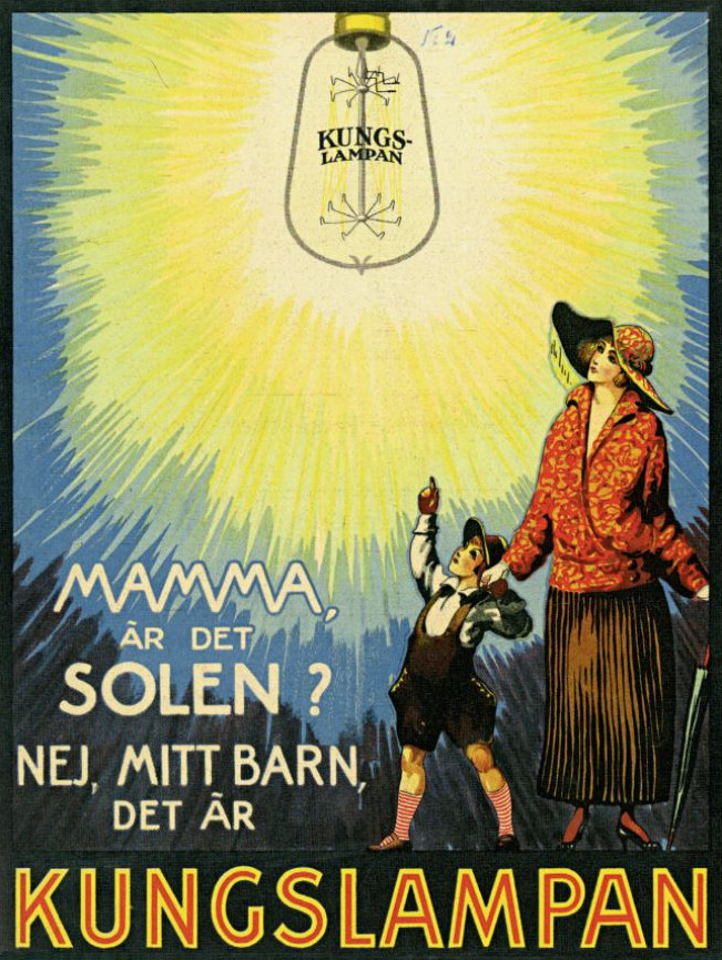 Reklamaffisch för Kungslampan Elektraverken AB, Stockholm.